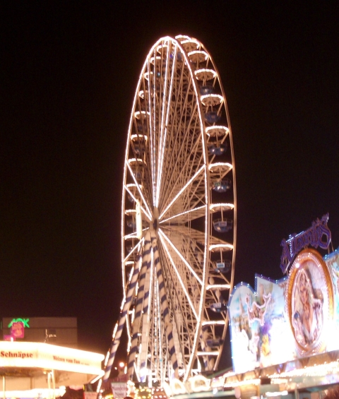 Rieenrad am Hofer Volksfest bei Nacht.